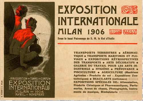 Categoria:Immagini delle Expo